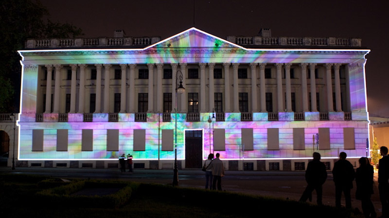 3D mapping - Animacje na budynku Pałacu Raczyńskich w Poznaniu